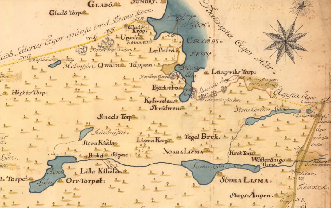 Del av Gabriel Bodings karta över Södra och Norra Lissma visande Lissmasjön med omgivning